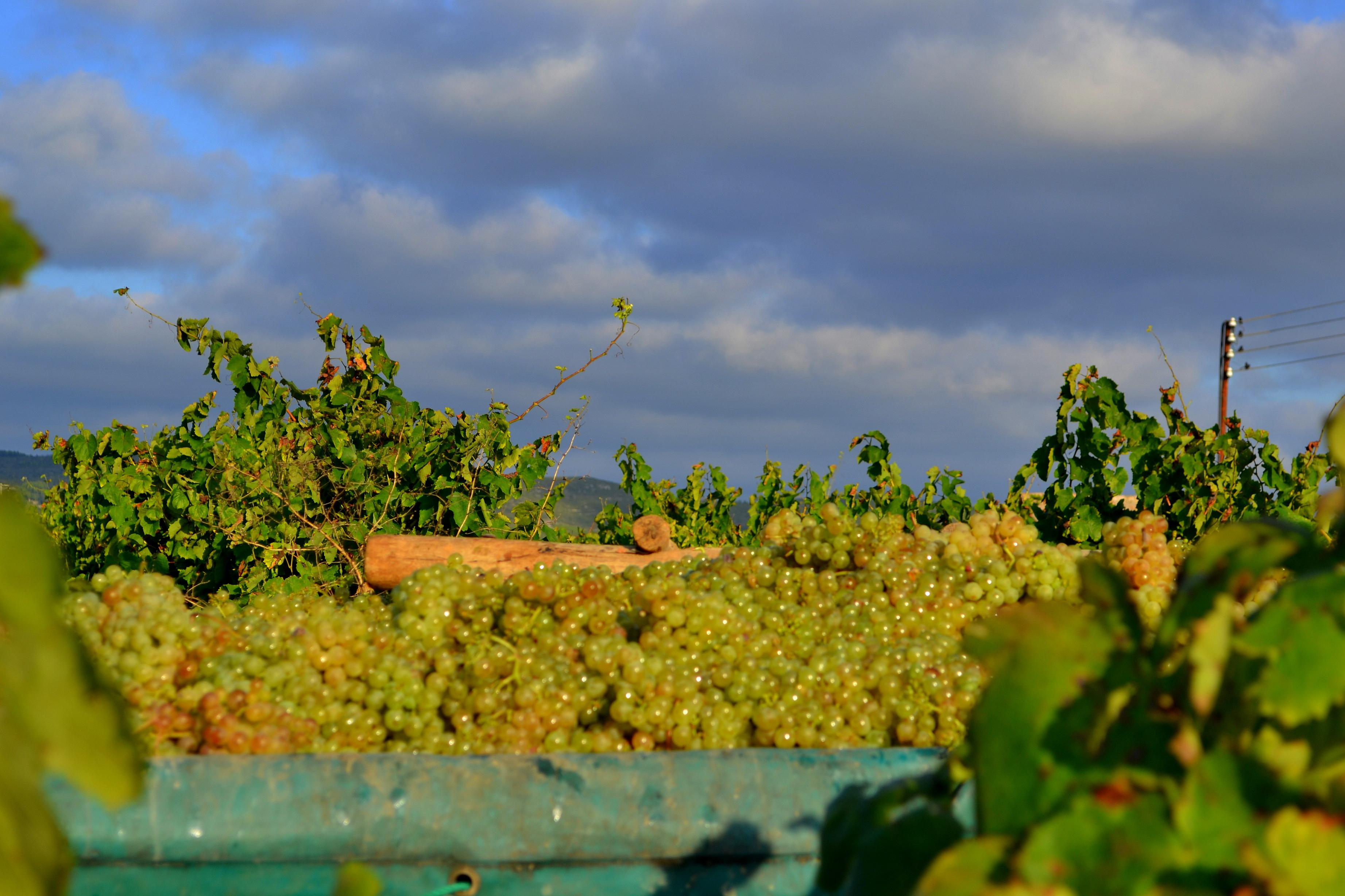 El xarel.lo es un varietat característica de Vilafranca del Penedes i els seus voltants vinícoles.